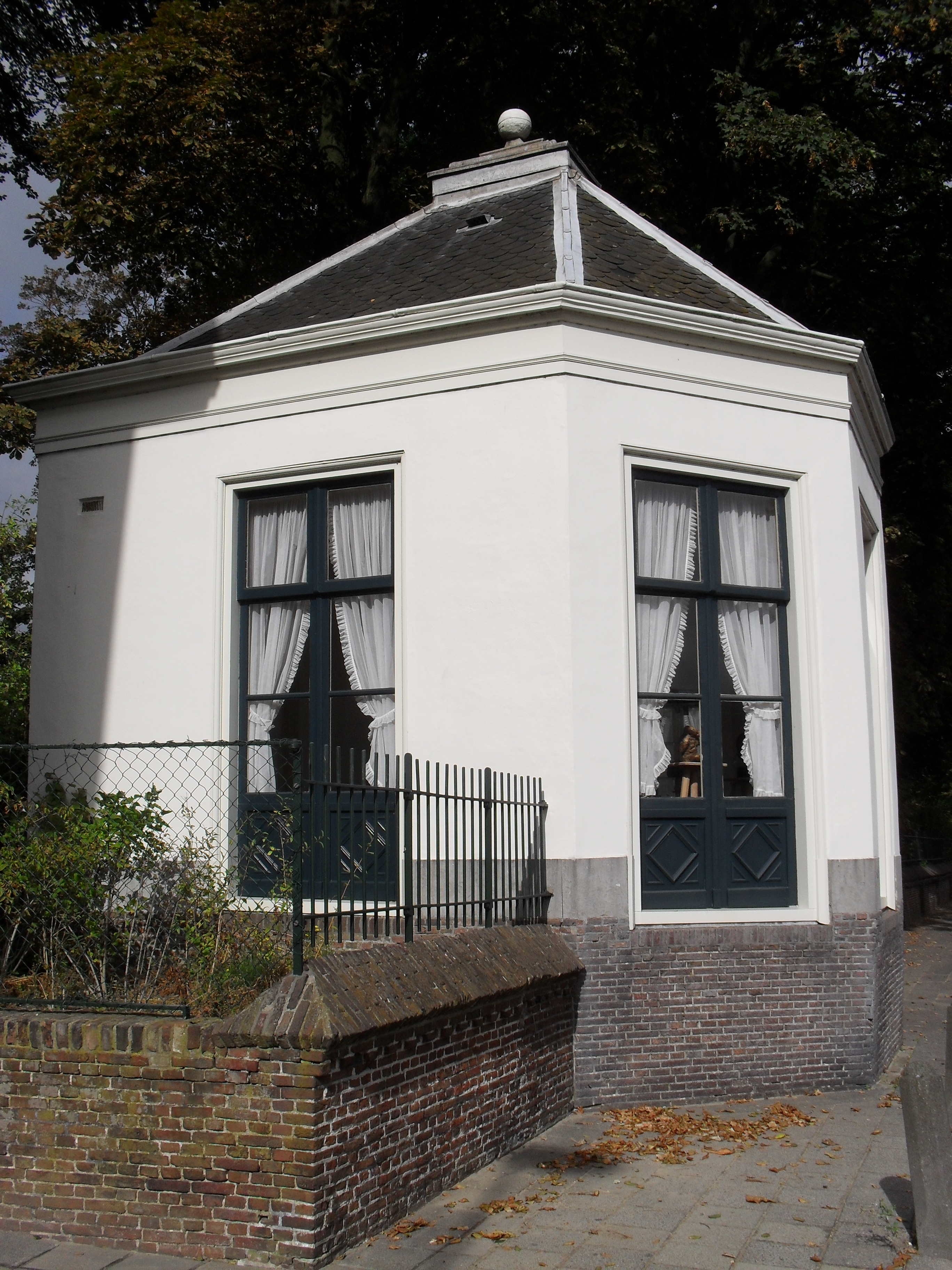 Tuinkoepel van landgoed Akerendam te Beverwijk.